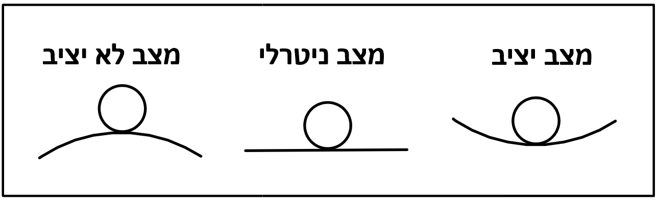 בתמונה מתואר הפוטנציאל עבור מצבים שונים של שיווי משקל תרמודינמי